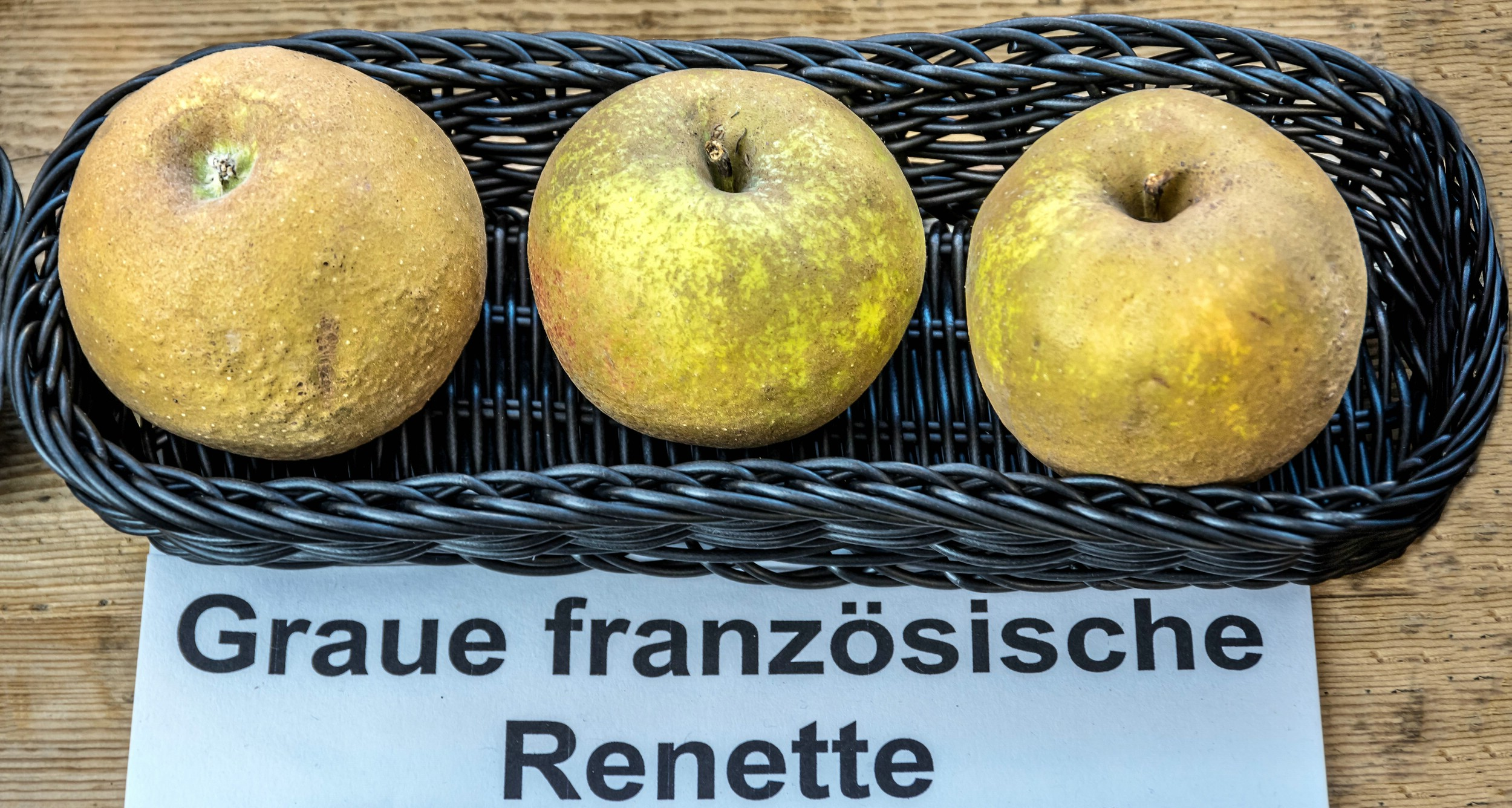 Alte Apfelsorten, von denen es im Badischen noch tragende Bäume gibt. Alle Aufnahmen au dem Oktober 2015